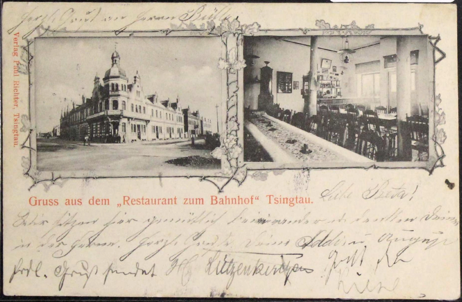 青岛车站饭店明信片